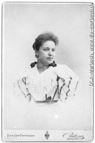 Maria Reinhard im weißen Kleid